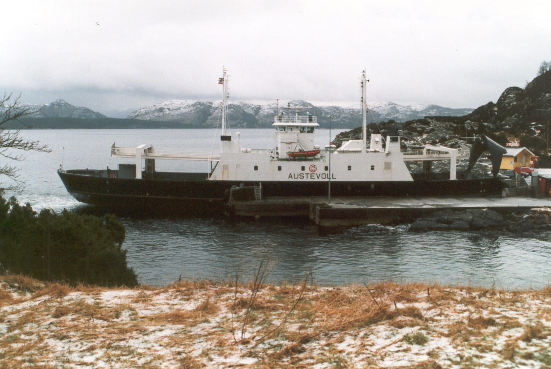 MF Austevoll built 1979